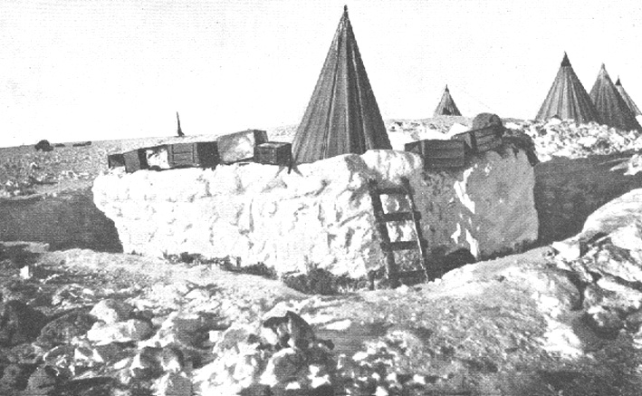 Hundelager auf der Ross Platte